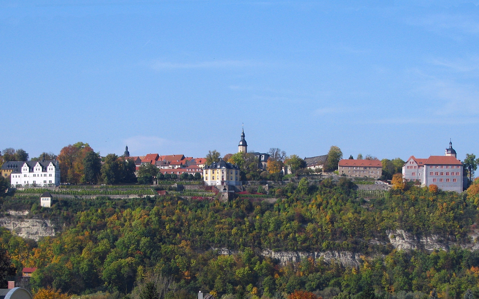 Kulturdenkmal Ensemble der drei Dornburger Schlösser in Dornburg/Saale in Thüringen - Foto Wolfgang Pehlemann Steinberg MG 0107